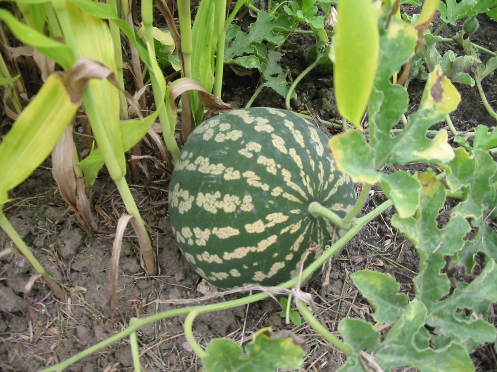 Fruit de Citrullus colocynthis (coloquinte officinale) Source Photo JH Mora prise en août 2004 à Milly-la-Forêt (CNPMAI)